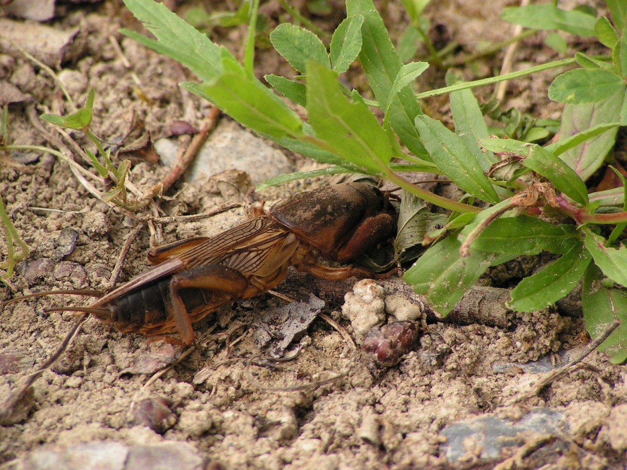 Gryllotalpa gryllotalpa